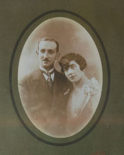 Photographie d'Yvonne et Albert Curvale à leur mariage civil, 1928